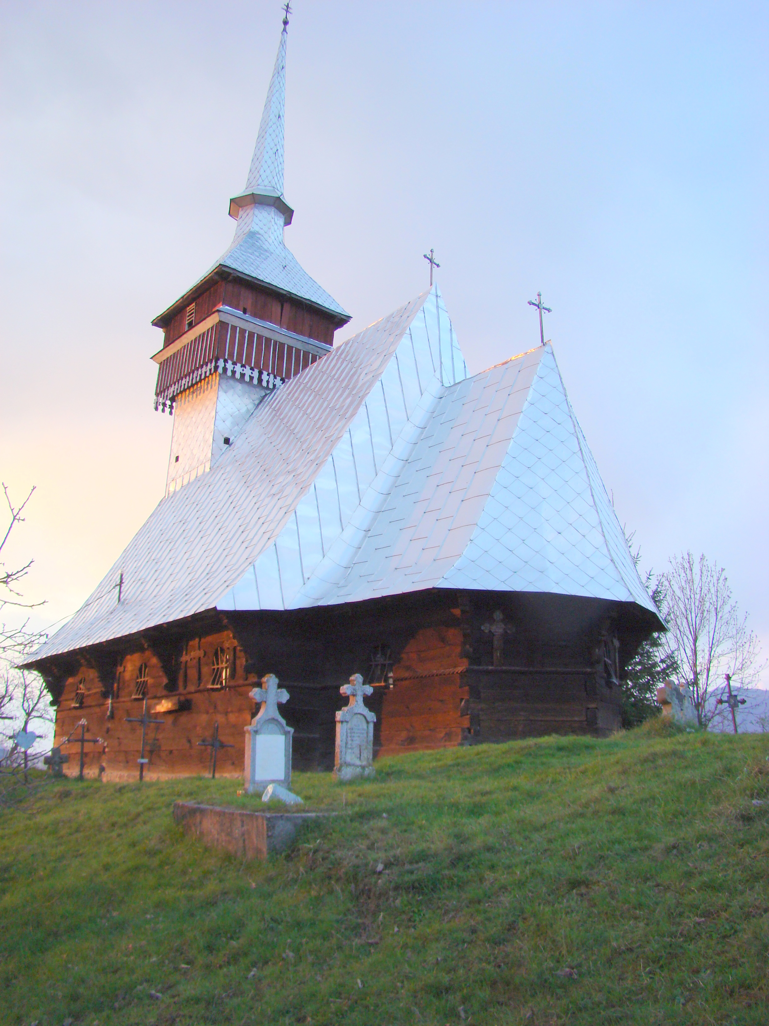 Biserica de lemn "Sf. Ioan Teologul", sat BRĂDET; comuna BUNTEŞTI